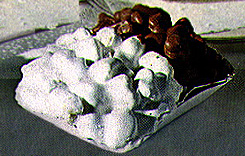 pignolata (piatto messinese e reggino)